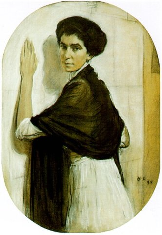 Софья Владимировна, урожденная Глебова (1884-1943), внучка князя Николая Петровича Трубецкого. Была замужем за Юрием Александровичем Олсуфьевым (1878-1938)